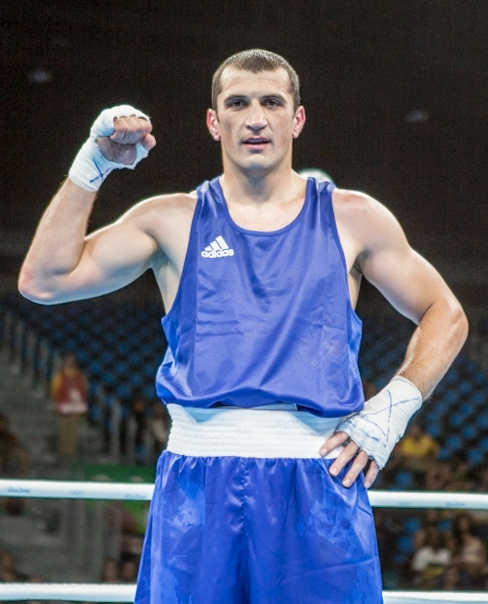 Abdulkadir Abdullayev from Azerbajan.